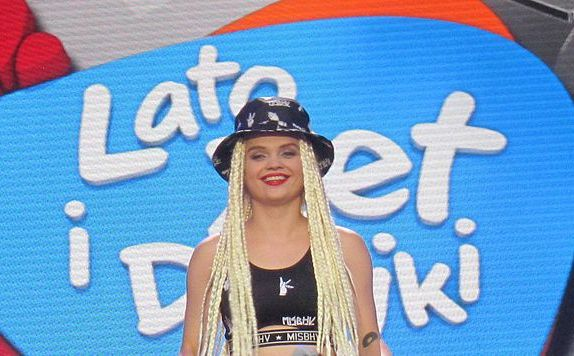 Koncert Lato Zet i Dwojki 2014 w Toruniu